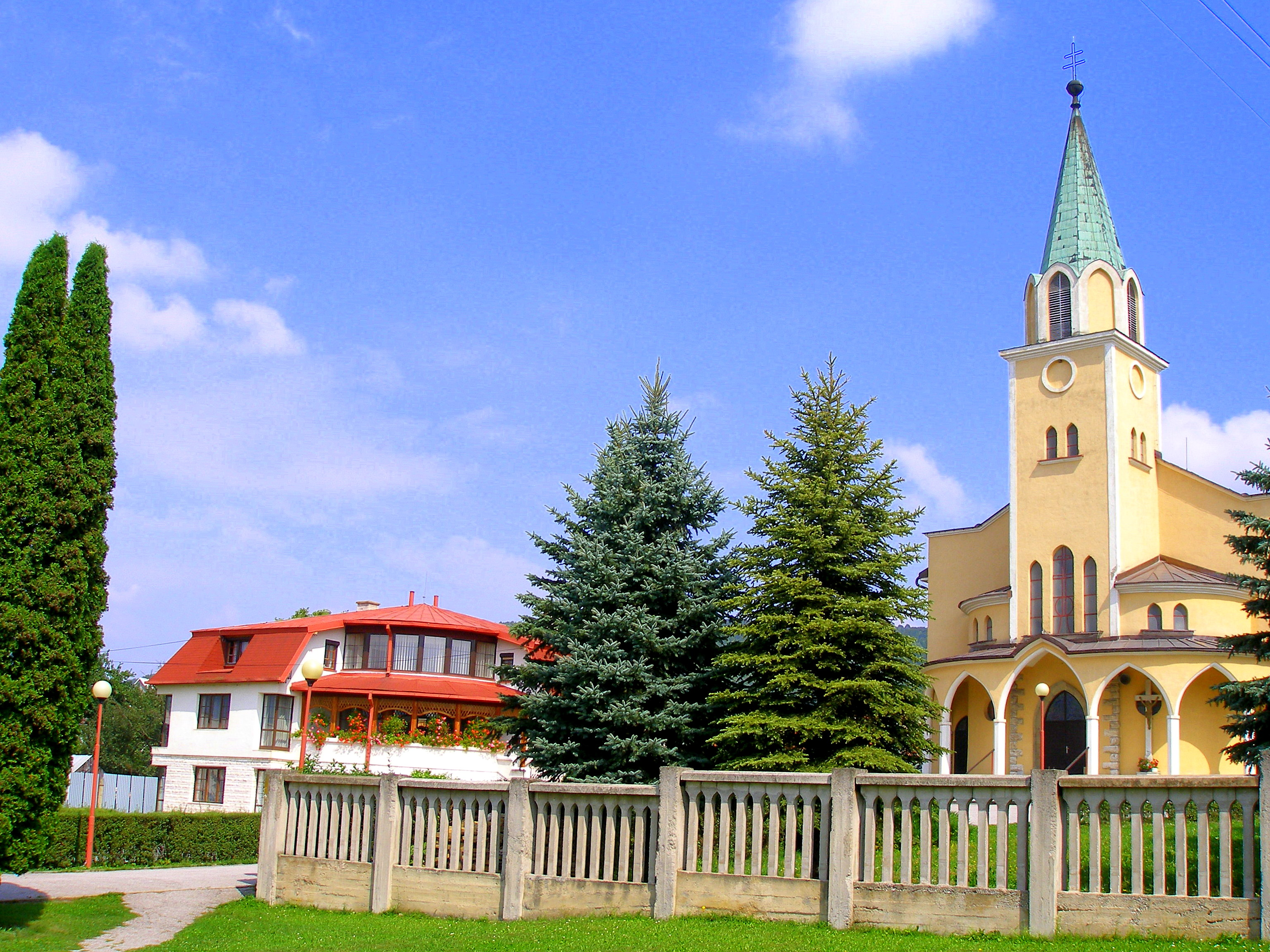 Šarišská obec Víťaz